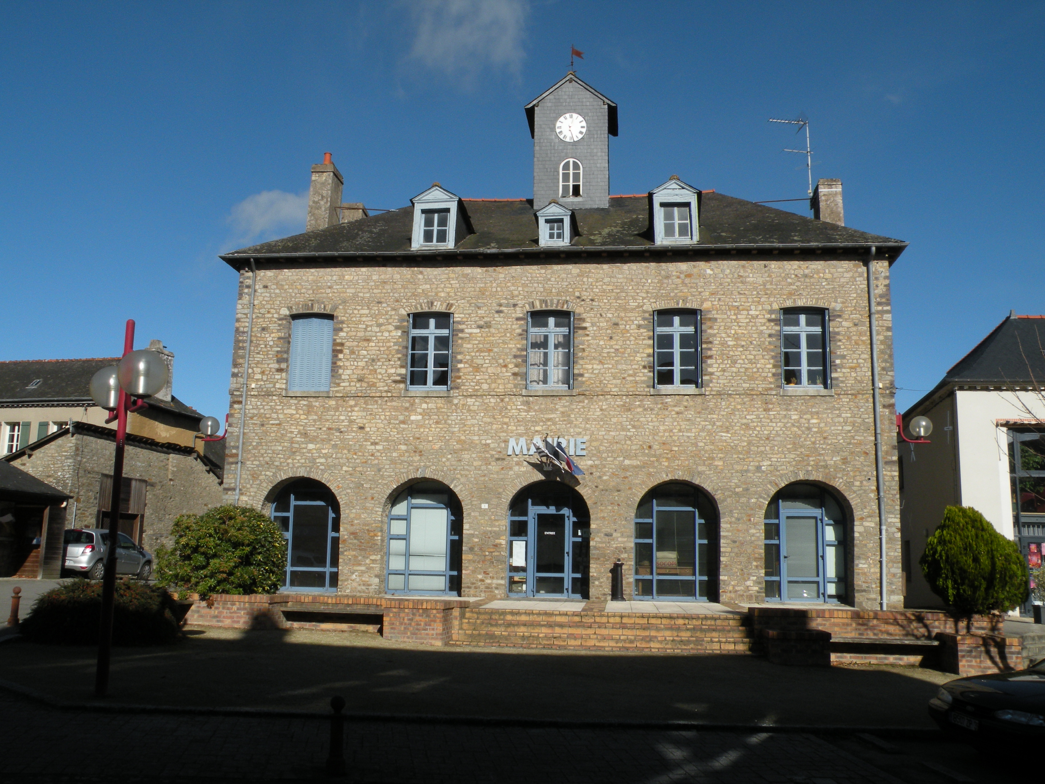 Mairie de Saint-Germain-sur-IlleBrezhoneg: Ti-kêr Sant-Jermen-an-Il